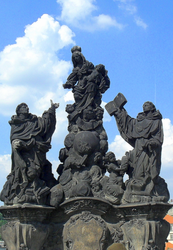 Karlův most, Staré Město a Malá Strana, mezi Křižovnickým náměstím a Mosteckou